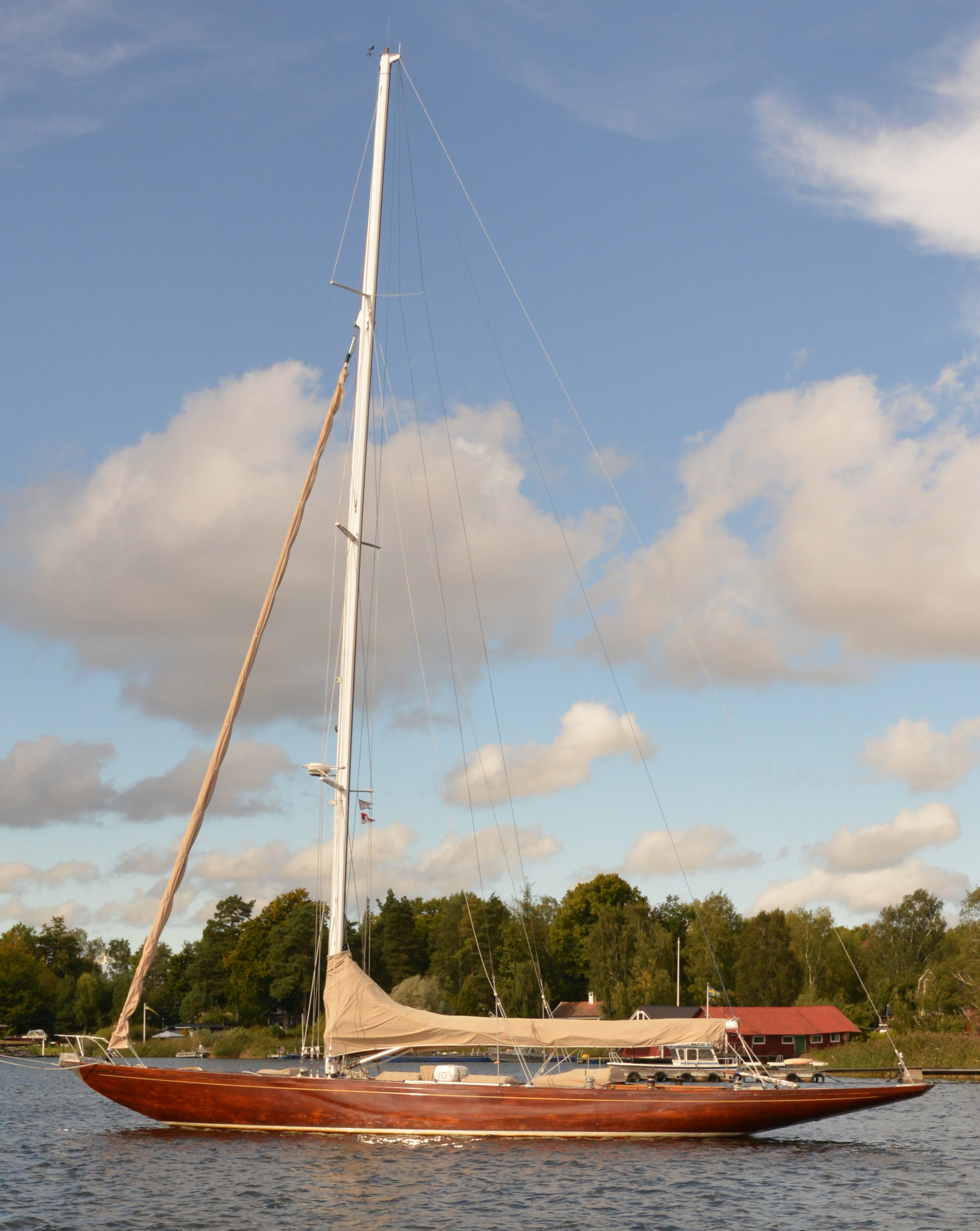 R10 Itaka vid boj i Stockholms skärgård